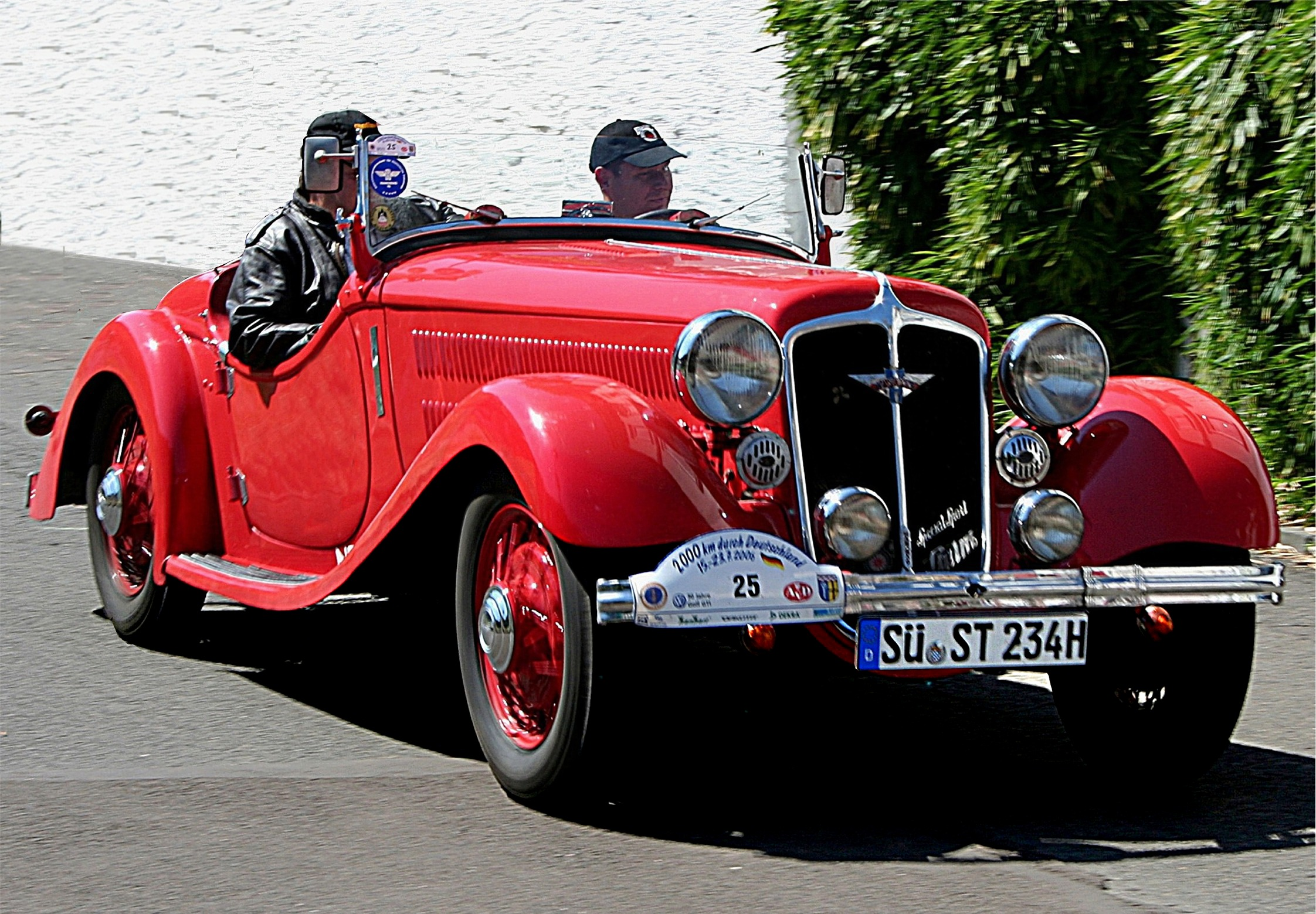 Hanomag Sturm Cabriolet, 6-Zylinder-Motor, 2252 cm³, 55 PS, ca. 115 km/h; Baujahr 1934